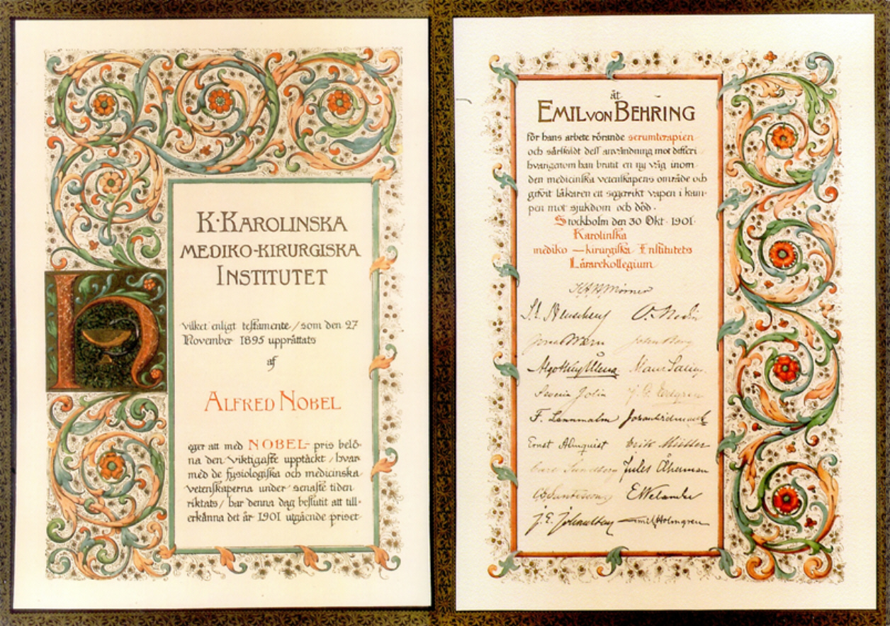 Emil von Behring – Nobel-Preis für Medizin